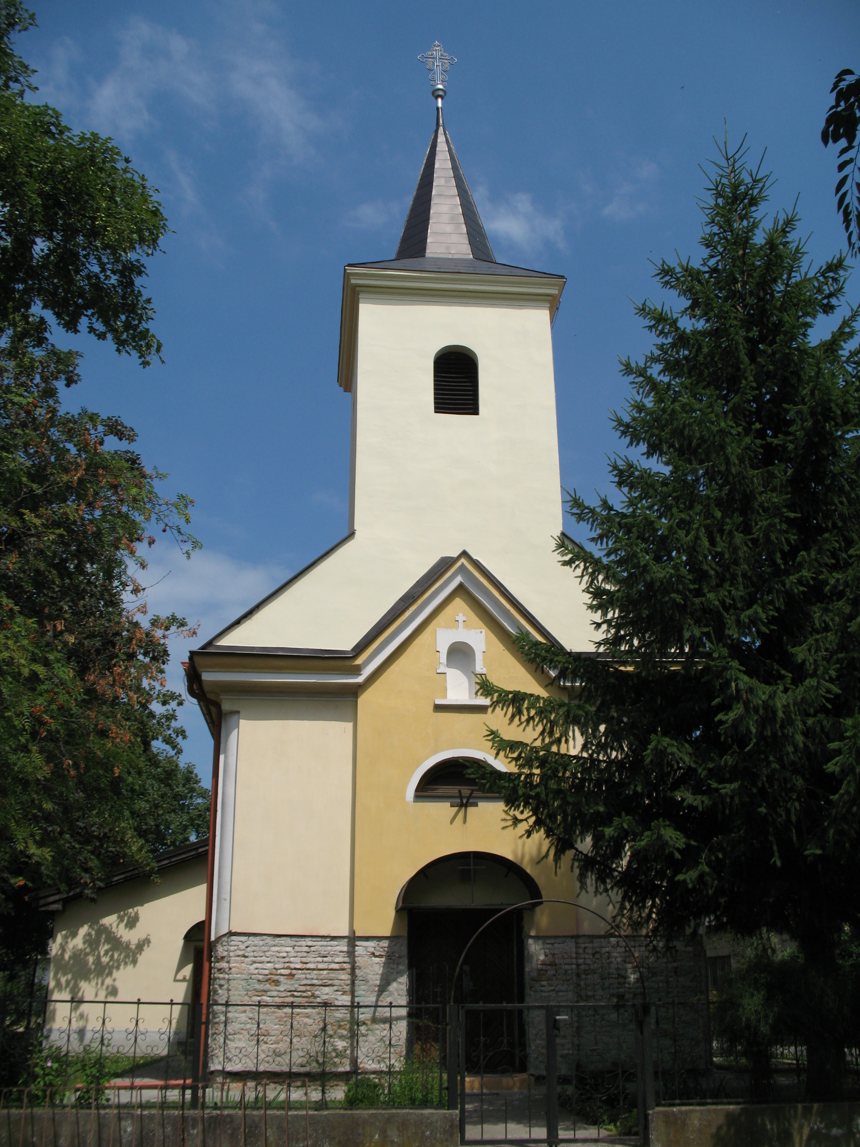 Felsővámos